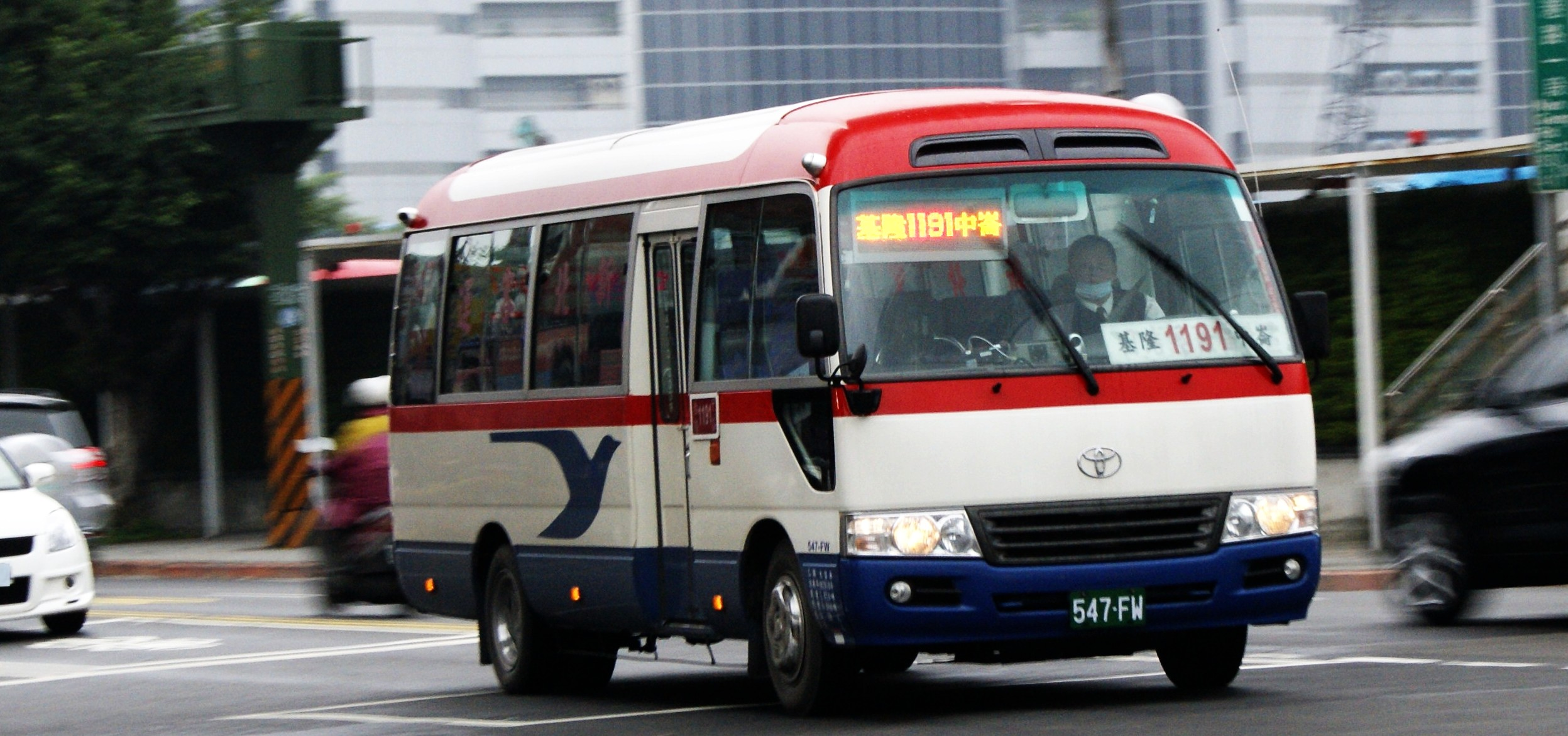 新北客運豐田Coaster中型巴士547-FW行駛公路客運1191線。